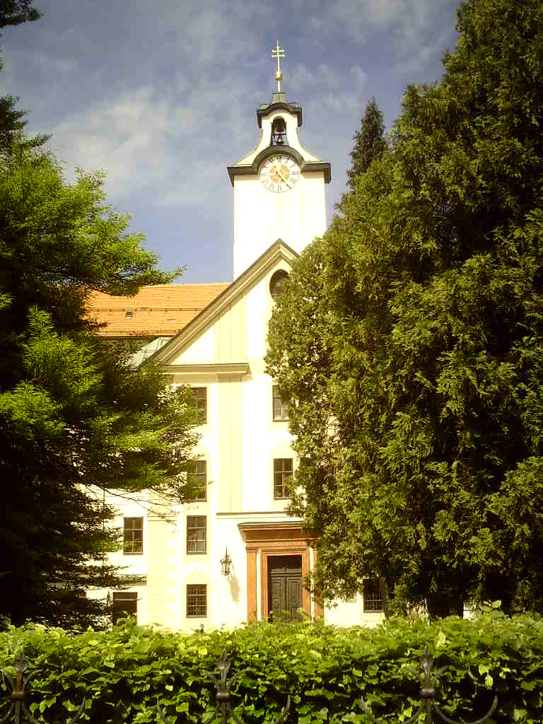 Schloss Hohenburg